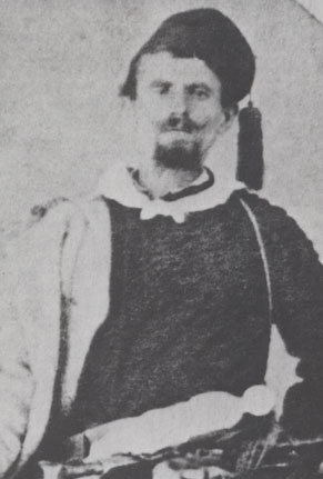 Dimitar Obshti, bulgarian revolutionist.